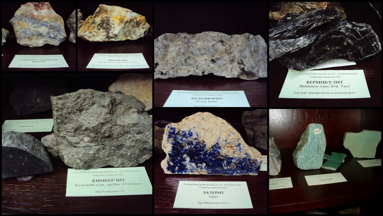 Татарча/tatarça: Халымбаджа2